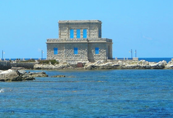 Villa Nasi, all'estremità del porto di Trapani